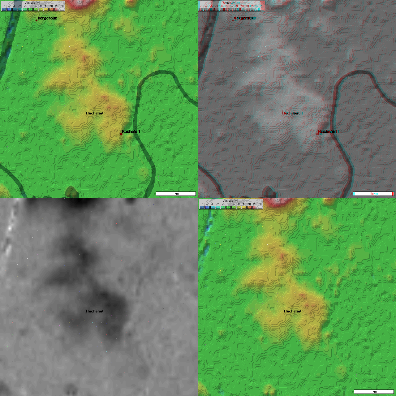 4 images topographique (5 km de coté) de Rochefort prisent par la mission SRTM. Image topographique + position des villes image topographique en relief + position des villes image topographique en niveau de gris (utile pour displacement map dans les logiciel 3D) Image topographique sans les villes Générée par le logiciel Radiomobile à partir des données domaine public de la mission SRTM de la NASA.